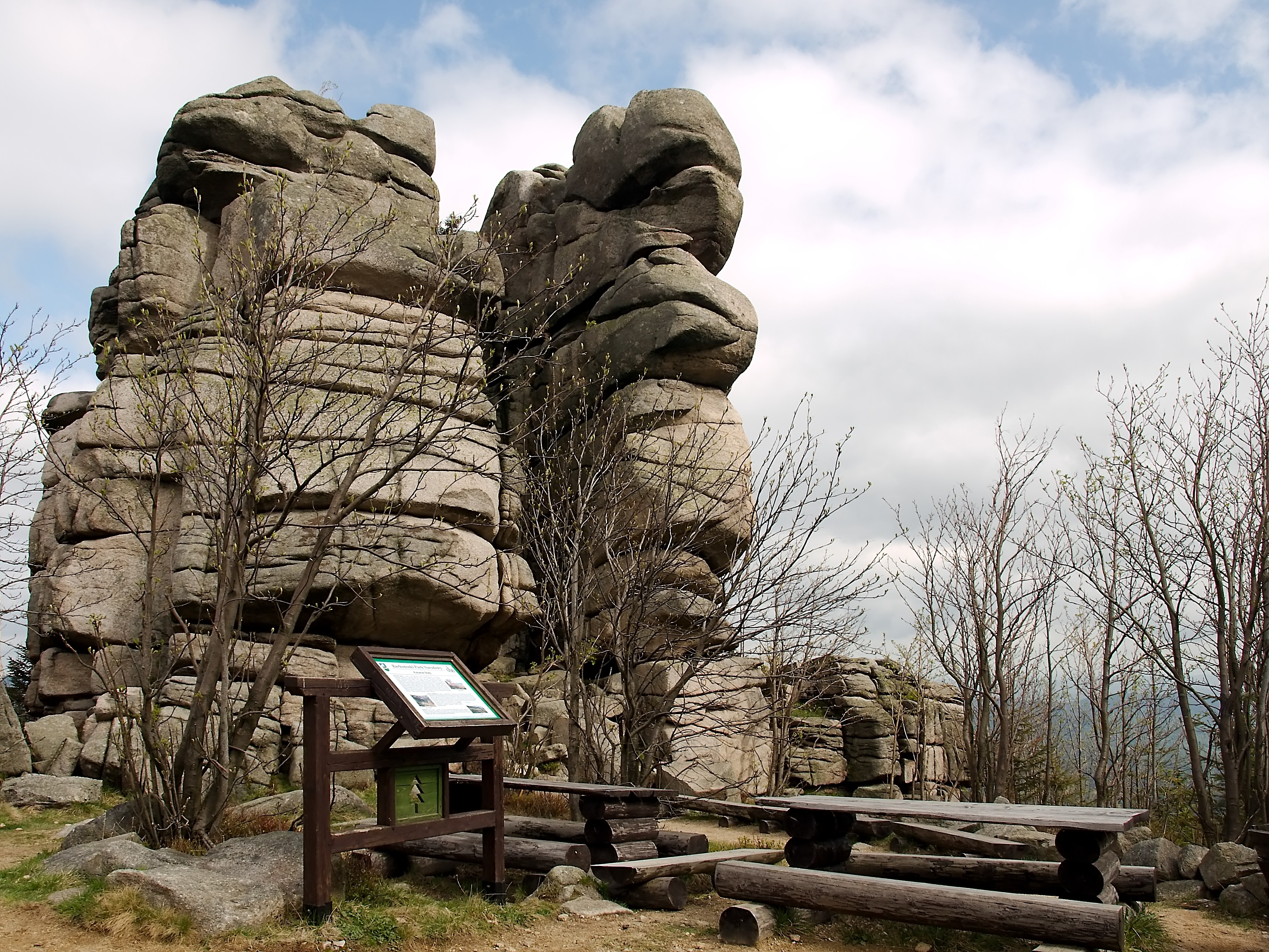 Punk widokowy przy "Kukułczych Skałach" na żółtym szlaku turystycznym ze Szklarskiej Poręby do schroniska "Pod Łabskim Szczytem".